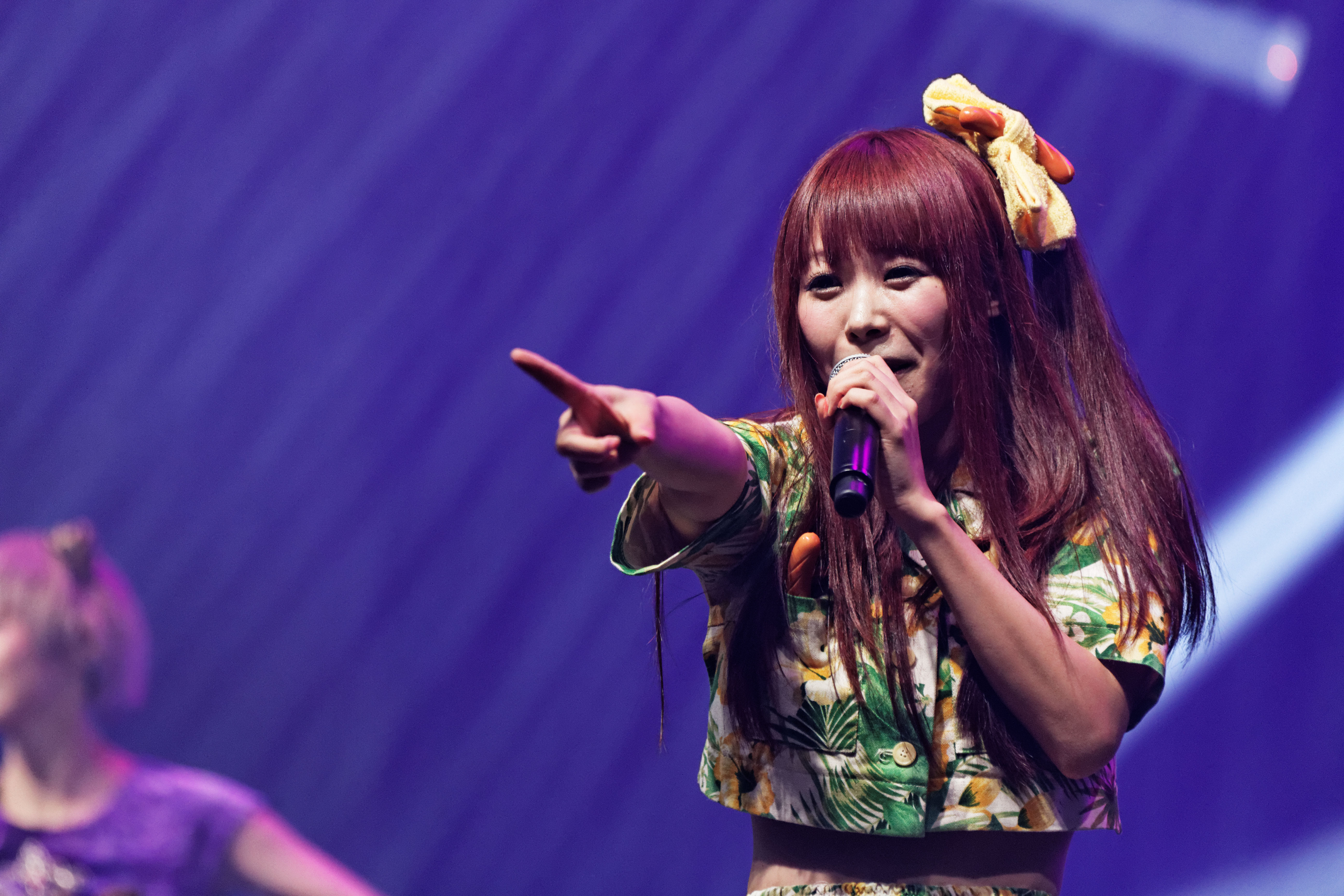 Dempagumi.inc en concert lors du live house du Japan expo Paris 2013.